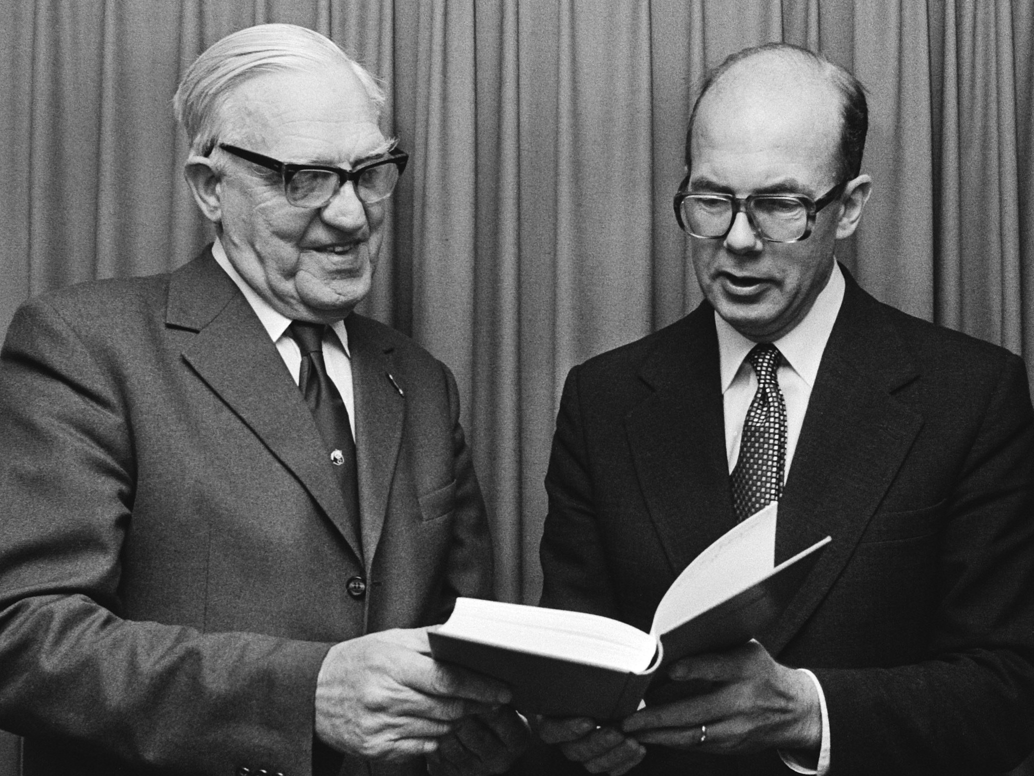 Patholoog-anatoom dr. J. Zeldenrust (l) overhandigt het eerste exemplaar van zijn boek aan minister De Ruiter van Justitie 8 november 1978